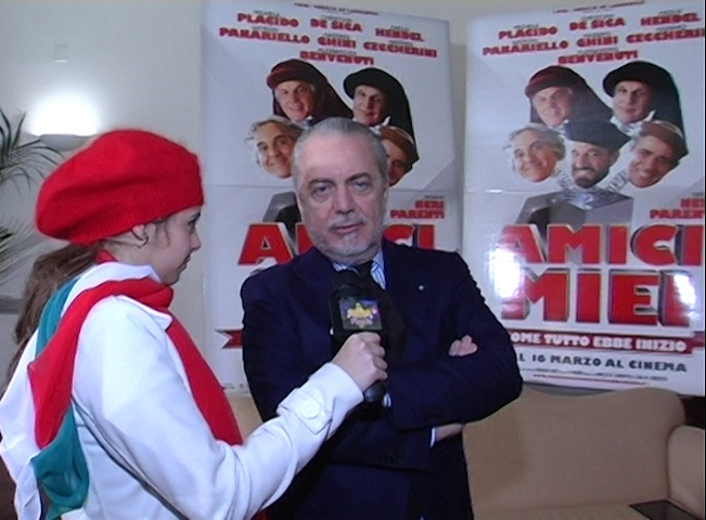 Intervista